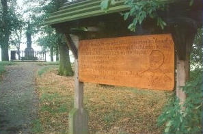 St. Veit Denkmal in Altenesch Der Text auf der Tafel lautet: Diese Gedenkstätte – errichtet 1834 – erinnert an den Kampf der Stedinger gegen ein übermächtiges Kreuzfahrerheer der als Schlacht von Altenesch in die Geschichte einging. Bolko von Bardenfleth, Thammo von Huntorp, Detmar tom Dieke fielen am 27. Mai 1234 mit ihrem Volk. 750. Jahrestag. Der Text auf den vier Seiten des Obelisken lautet: Straßenseite (Ostseite): Den im Kampfe fuer Freiheit und Glauben auf diesem Schlachtfelde gefallenen Stedingern. Südseite: Am 27. Mai 1234 unterlag den maechtigen Feinden das tapfere Volk. Nordseite: Bolke von Bardenfleth Thammo von Huntorp Detmar vom Dieke fielen als Fuehrer mit ihren Bruedern. Westseite (Rückseite): Am Iahrestage der Schlacht 1834 geweihet von spaeten Nachkom̄en.